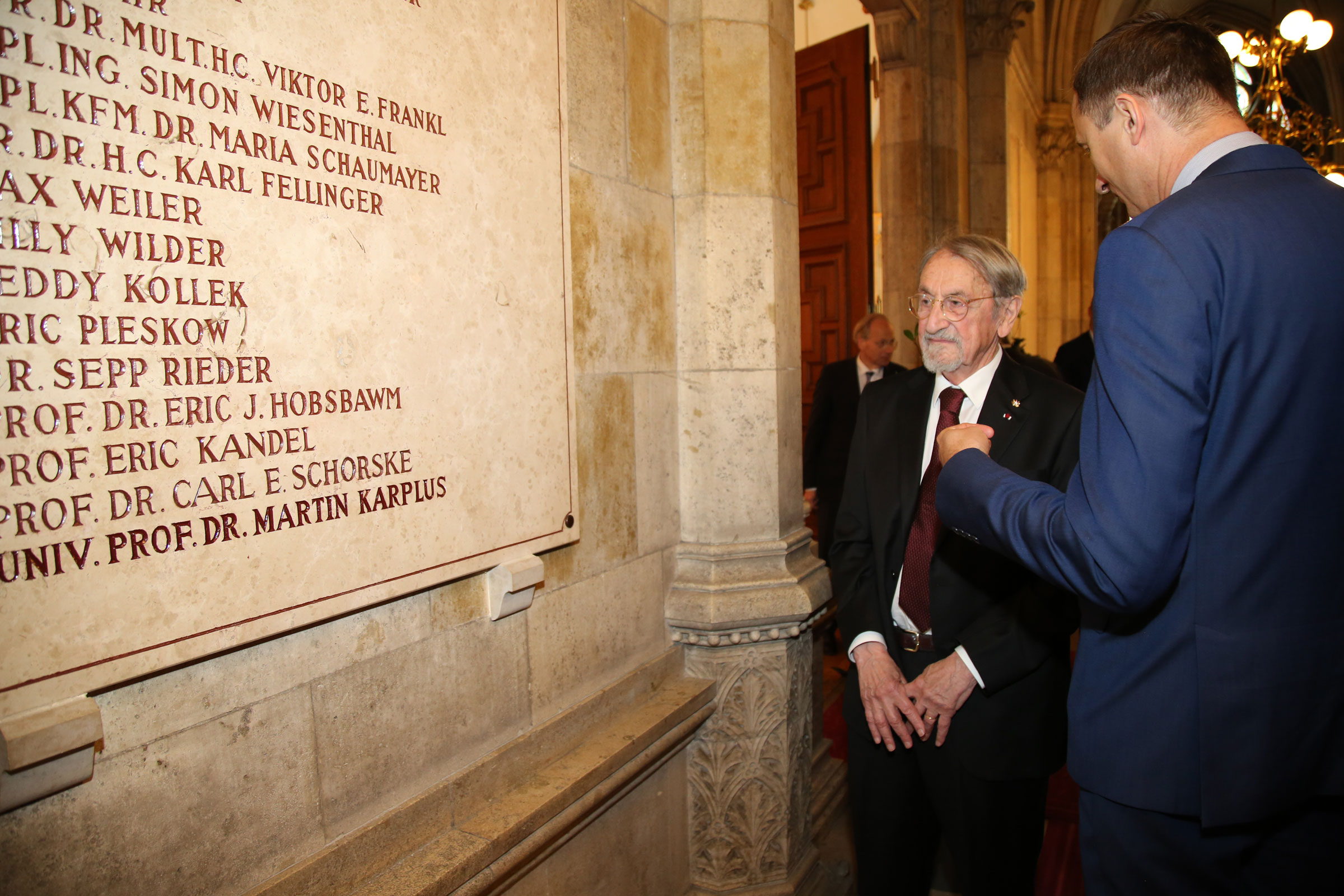 Ehrentafel für Martin Karplus, Nobelpreisträger für Chemie, Ehrenbürger von Wien mit Kulturstadtrat Andreas Mailath-Pokorny